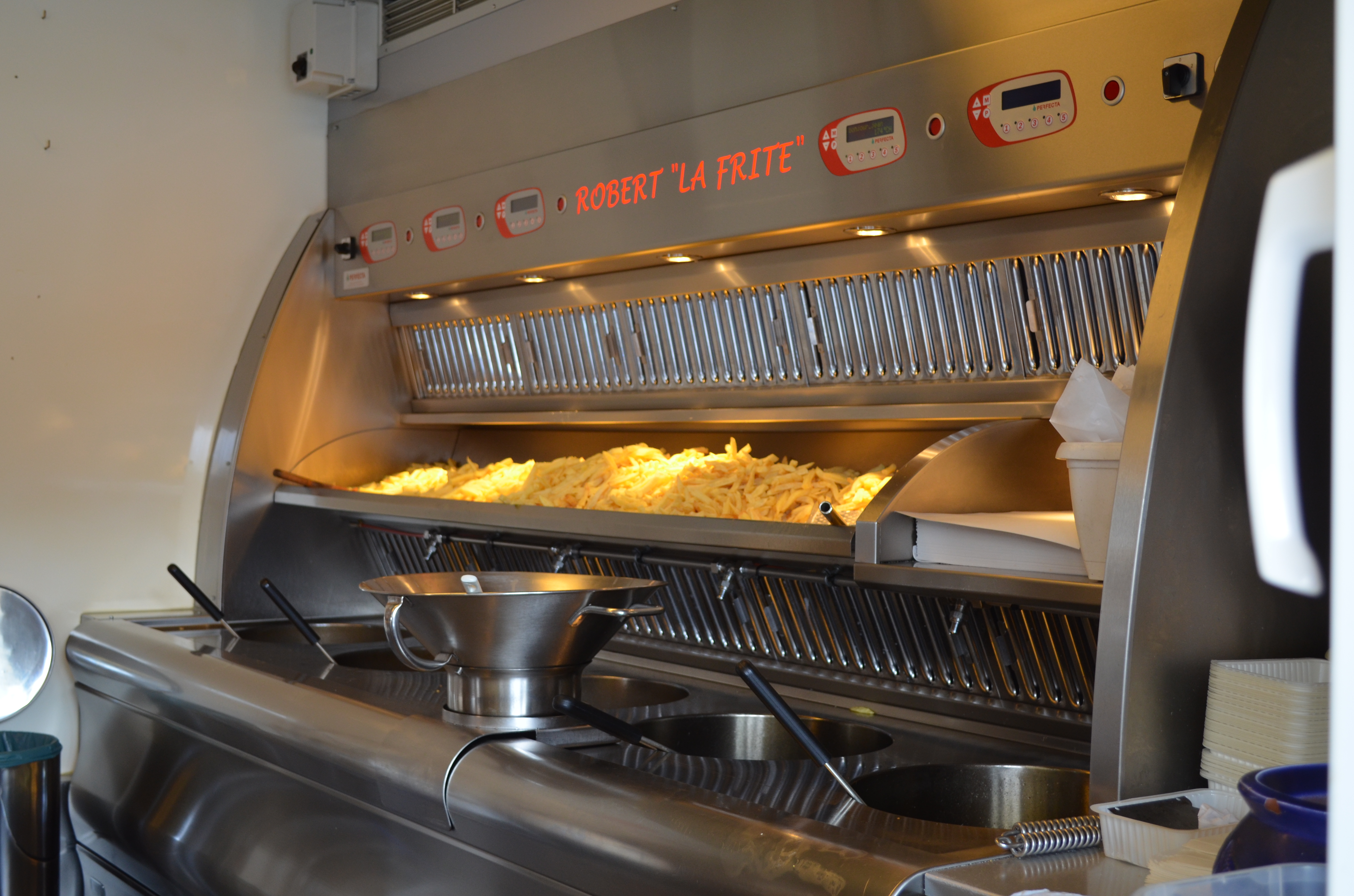 Charleroi (Belgique) - friterie Robert la Frite (depuis 1952)